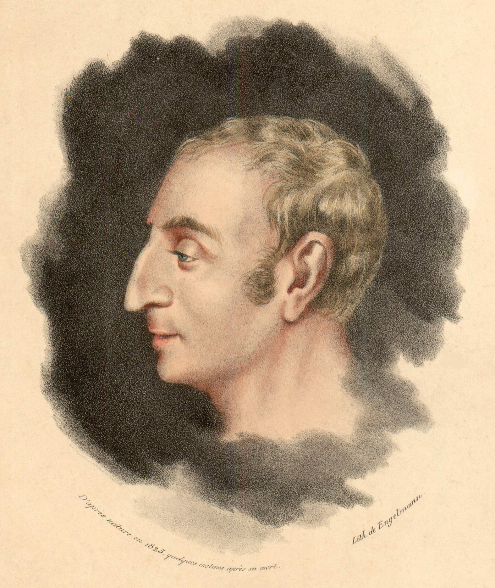 Claude-Henri de Rouvroy, comte de Saint-Simon. Gravure de Gottfried Engelmann d'après un portrait dessiné en 1825, quelques instants après la mort du philosophe.